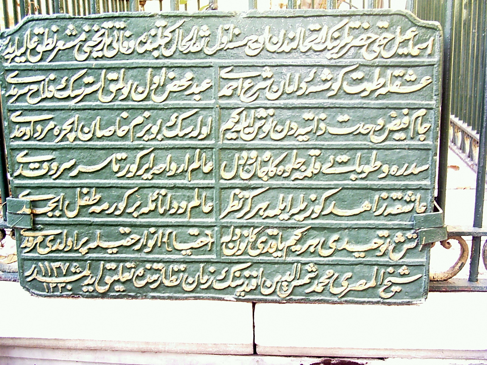 An Ottoman inscription on Ismael Hakki Bursevi's tomb at İsmail Hakkı Kuran Kursu, Tuzpazarı, İsmail Hakkı Cd., 16020 Osmangazi, Bursa